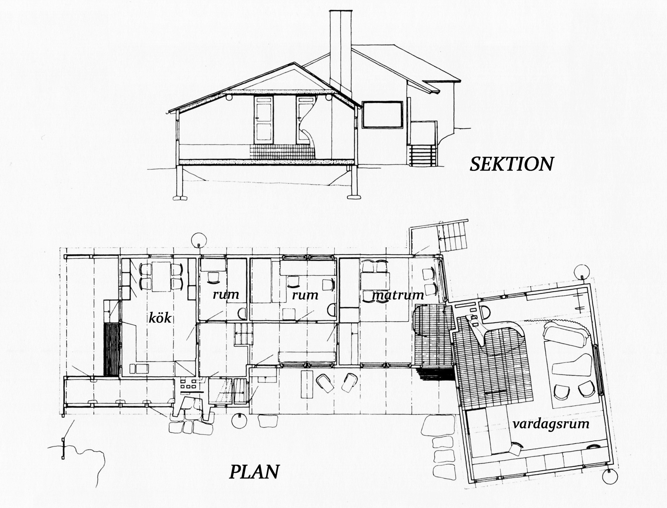 Ritning till sommarhuset Stennäs